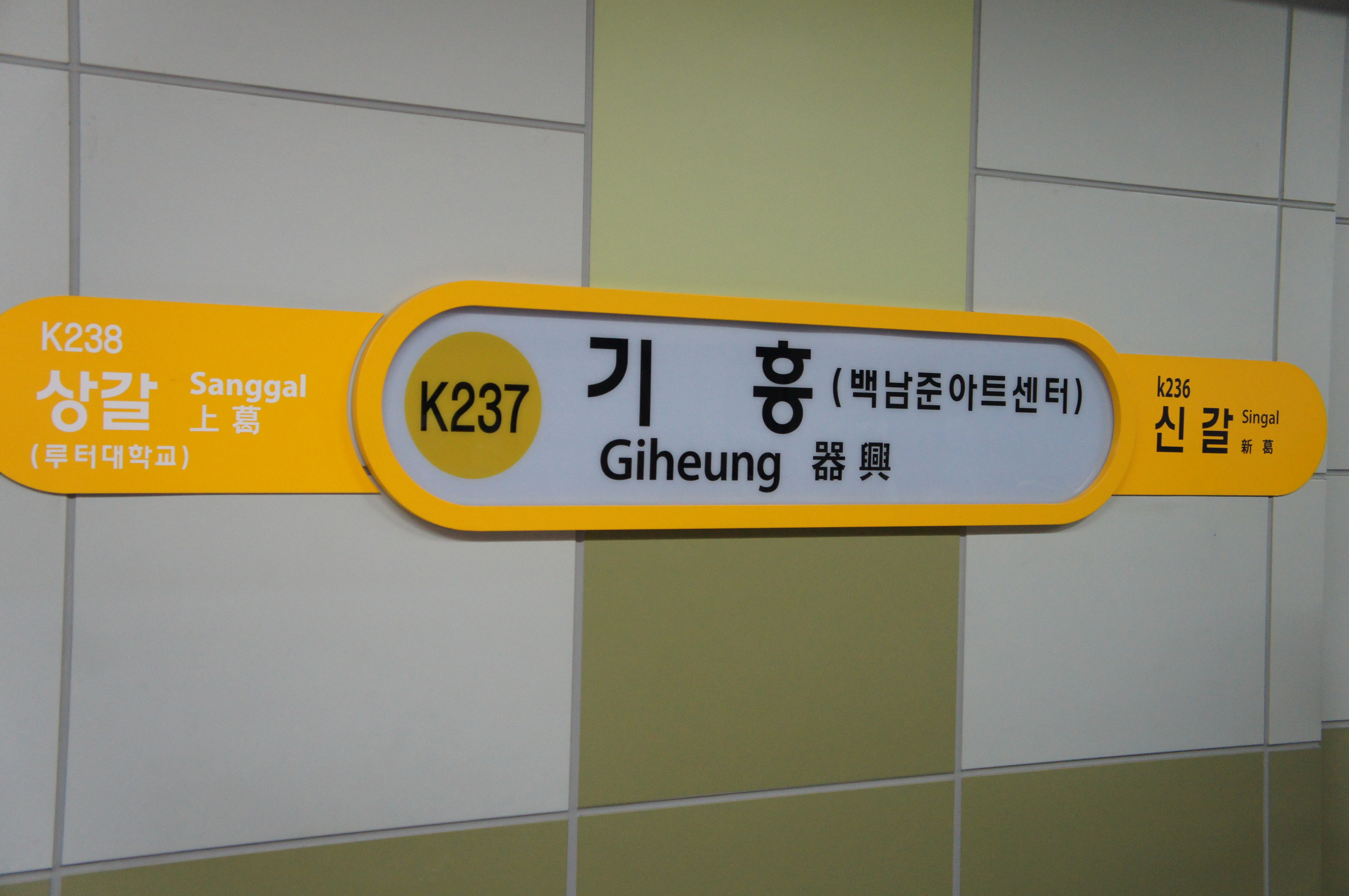 기흥역 역명판